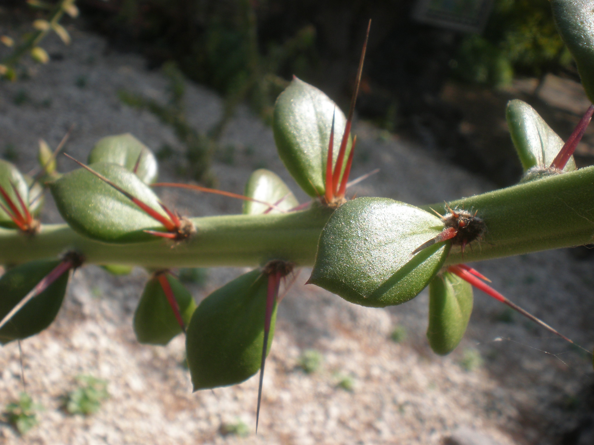 Jardín Botánico de la UNAM, México D.F.